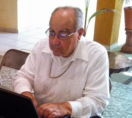 Mons. José Fernández Arteaga